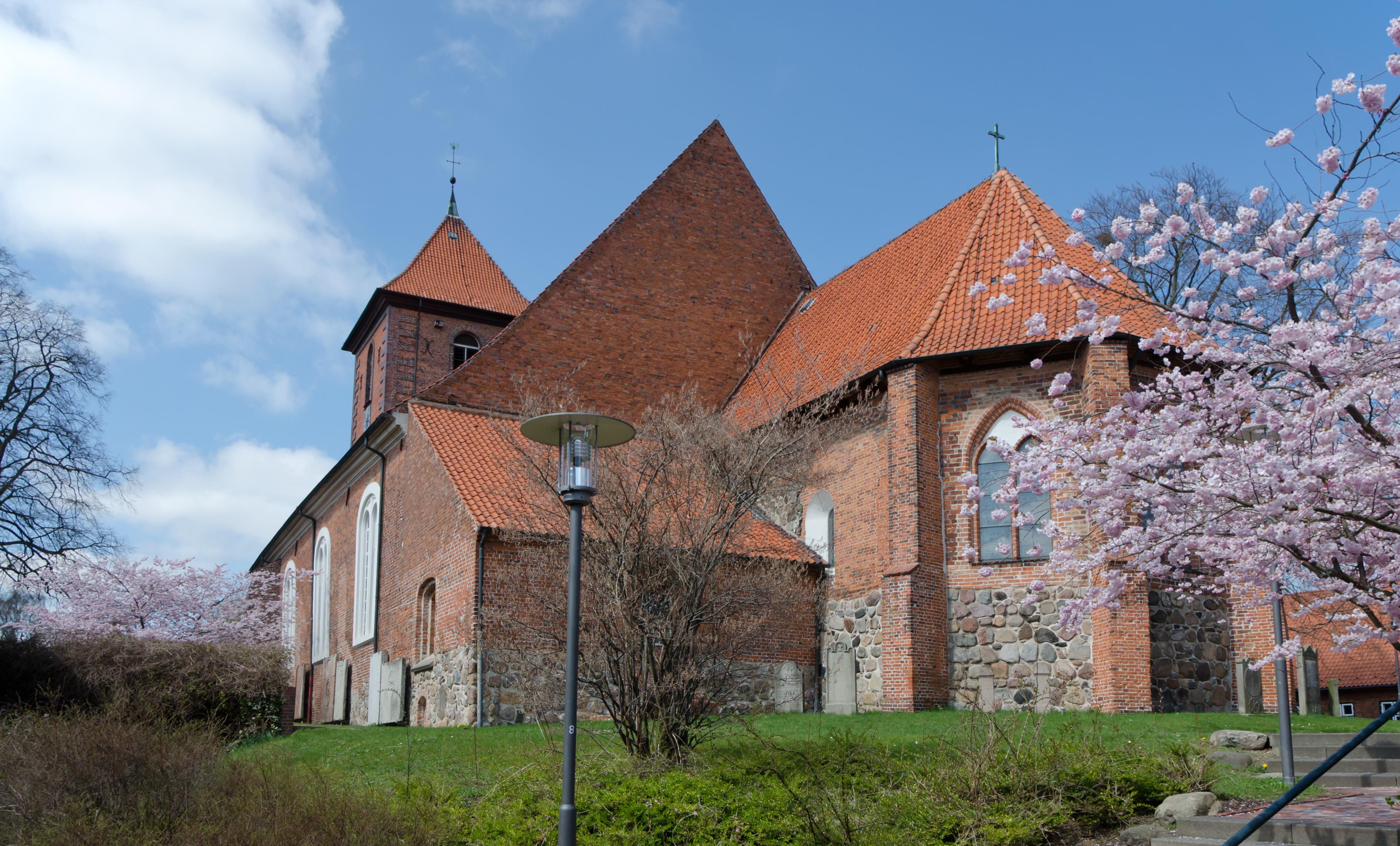 Preetz Kirche von Südosten